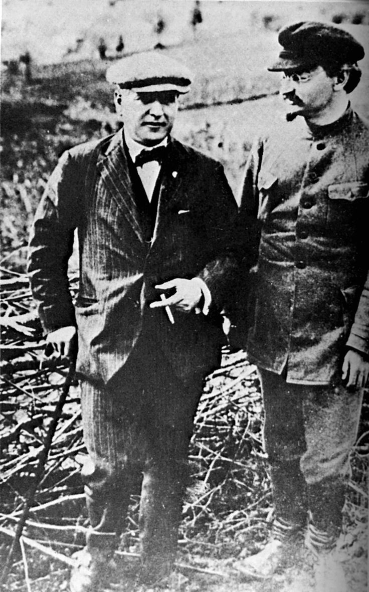 Раковский и Троцкий (1924)